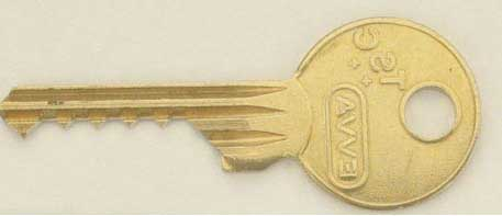 Bumping Key